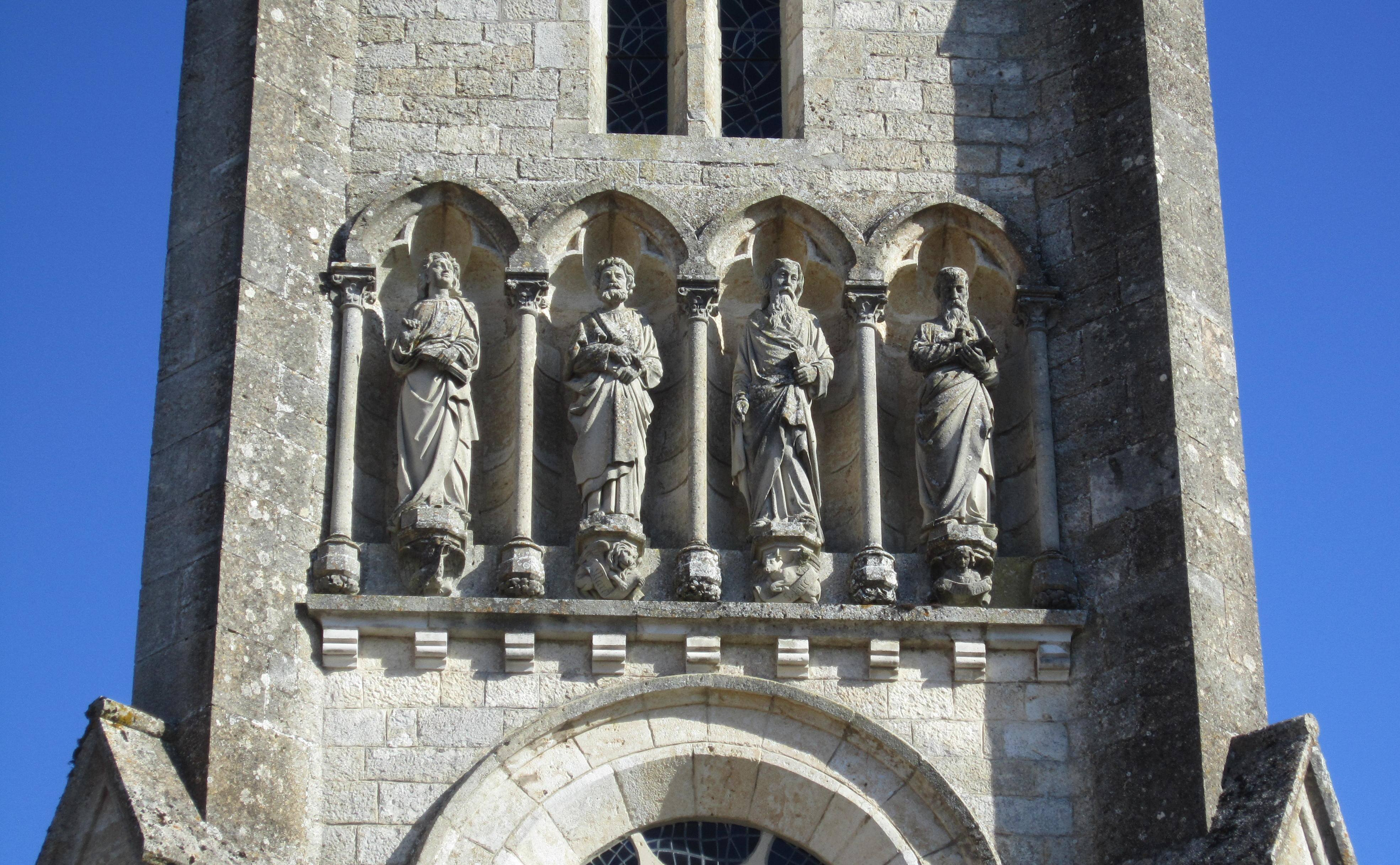 Détail de la tour du clocher de Buxerolles (Côte-d'Or)